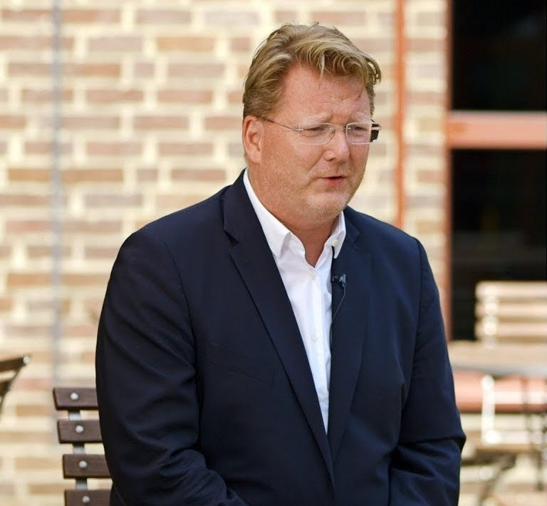 Während hierzulande noch lang und breit über die Digitalisierung des Bildungswesens debattiert wird, sind uns die Amerikaner längst meilenweit voraus.